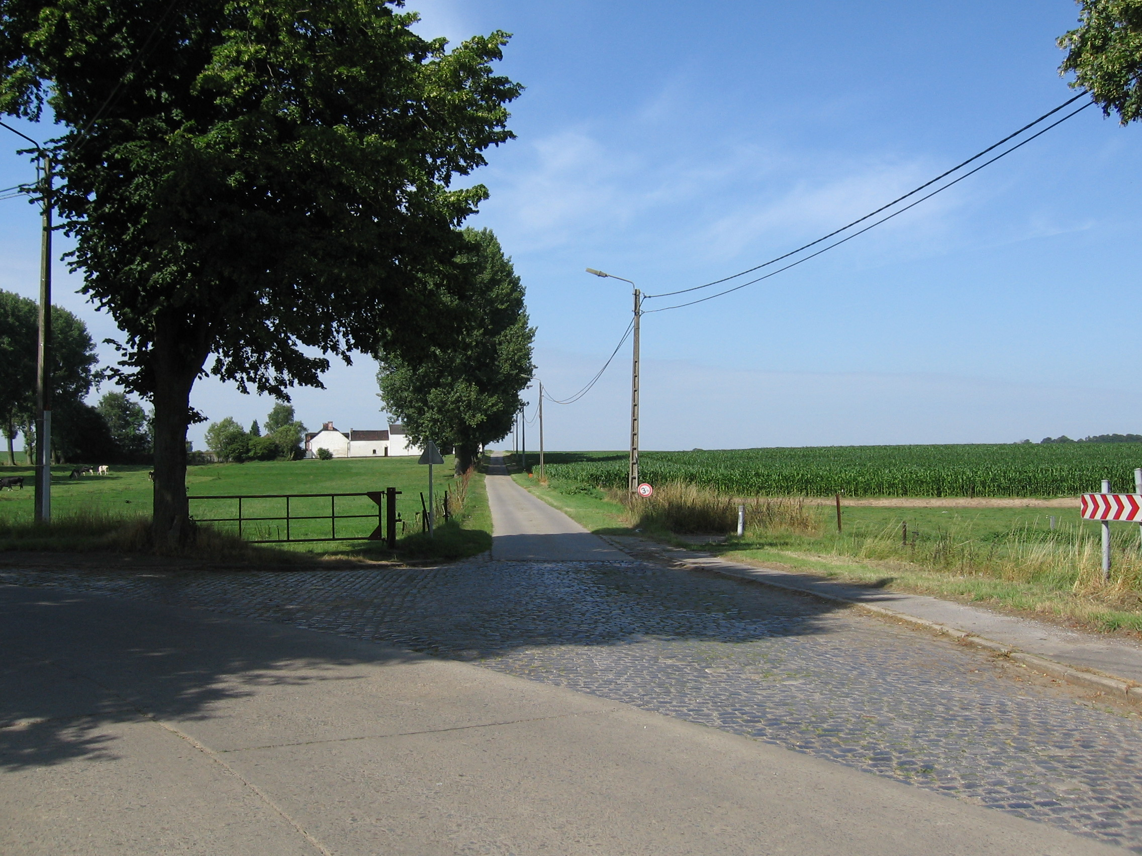 Section de la chaussée romaine Bavai-Cologne (chaussée Brunehaut) à son passage à Villers-Perwin (commune de Les Bons Villers, Belgique)